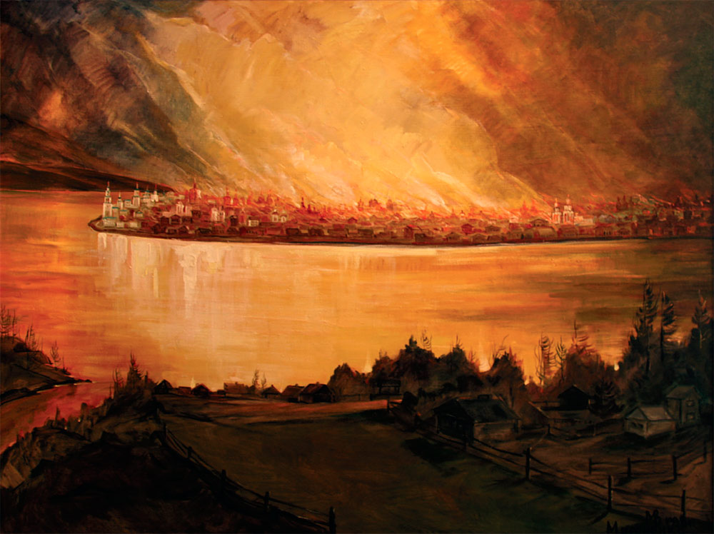 Большой иркутский пожар 1879 года. Картина Дмитрия Романова (1913)